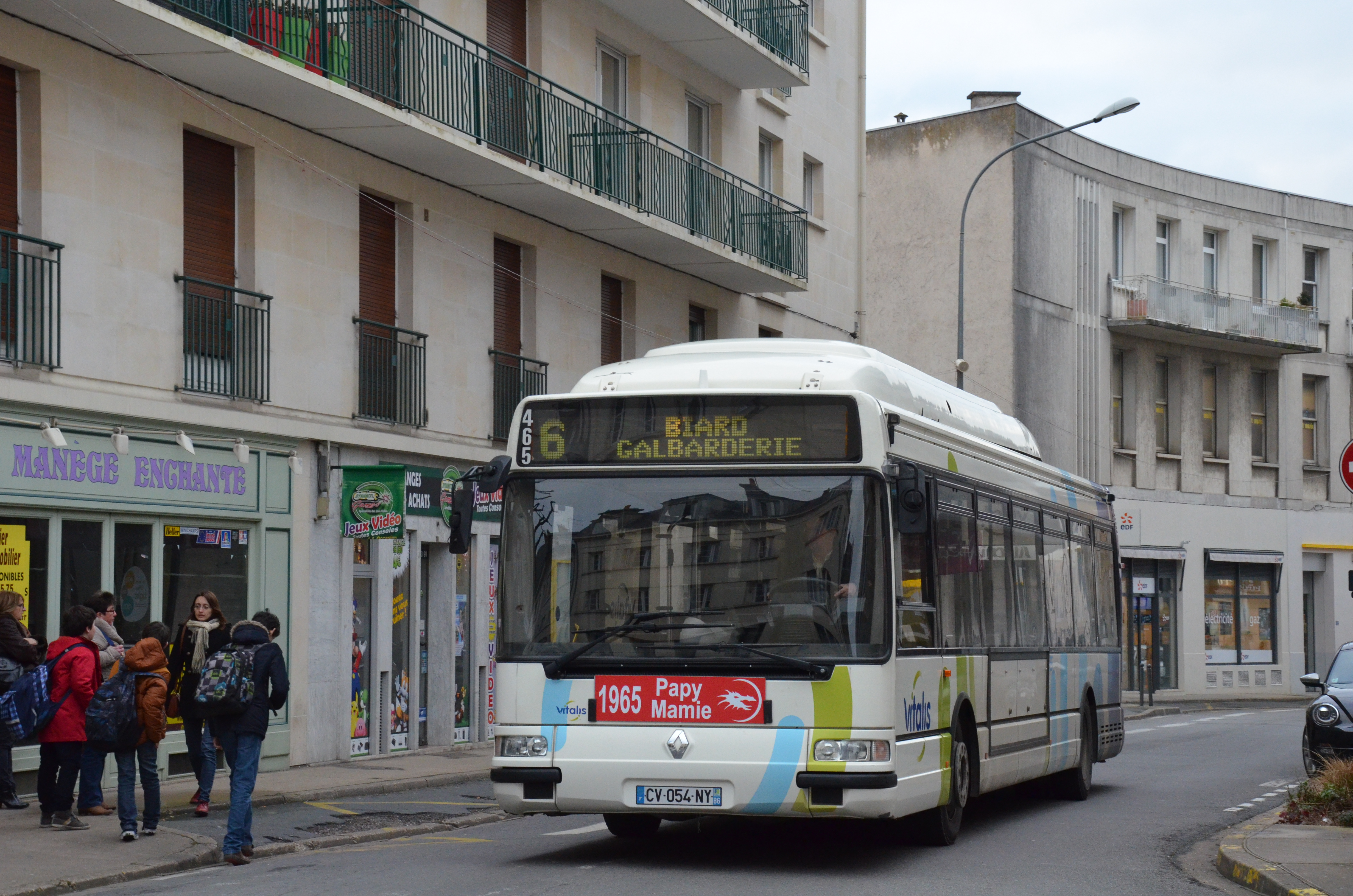 Renault Agora S n°465 sur la ligne 6 du réseau Vitalis, à Pôle Pétonnet Hulin.